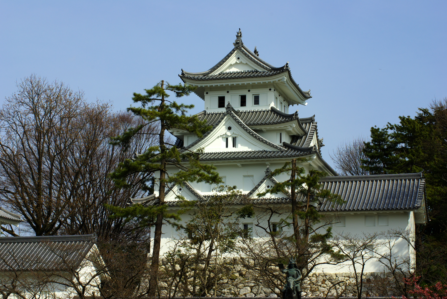 外観修復を終えた大垣城天守